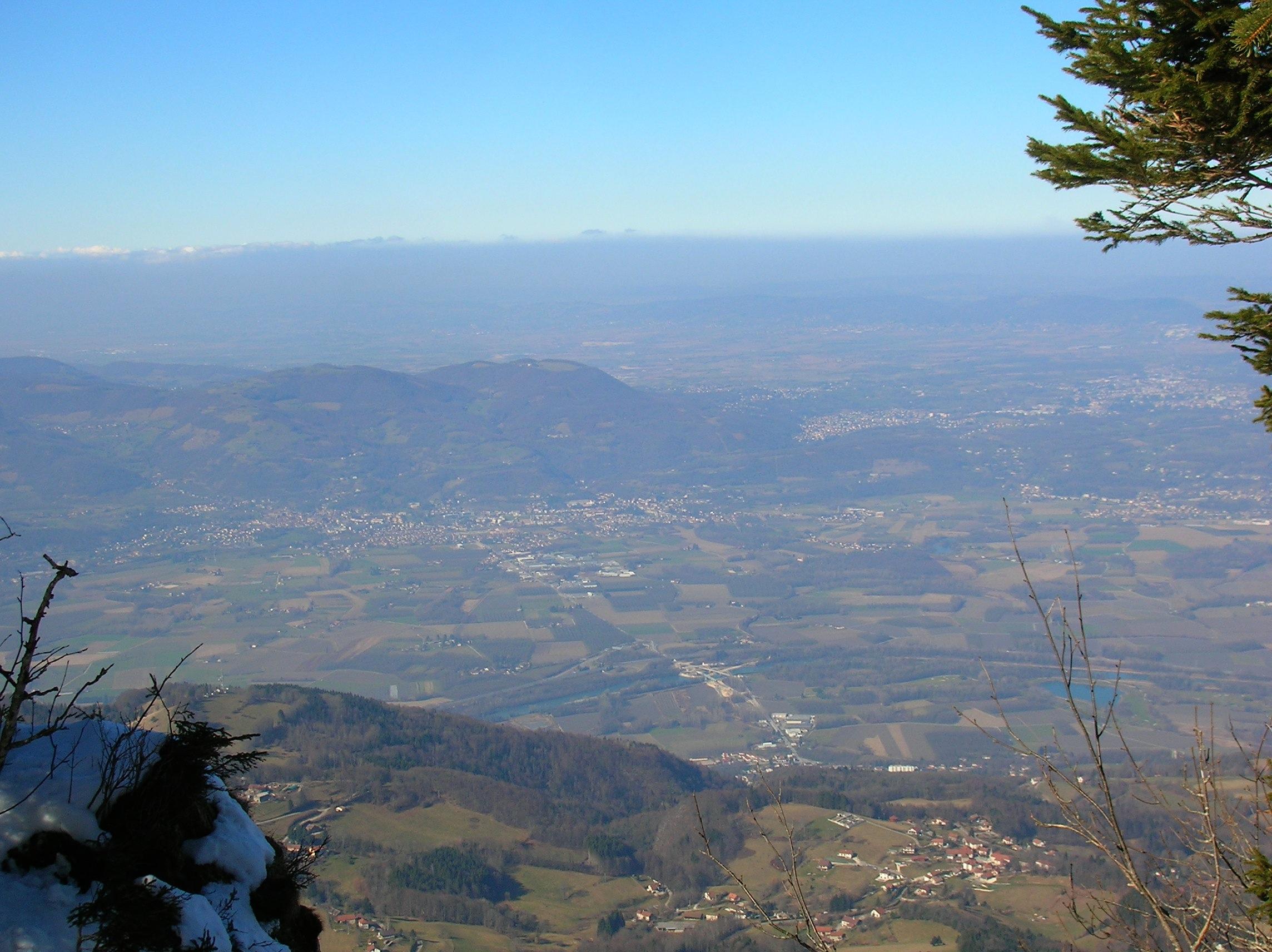 Panorama vu depuis La Grande Brèche (Gève, Autrans, Isère, AuRA, France). Vue sur Montaud et sur la vallée de l'Isère et le voironnais.